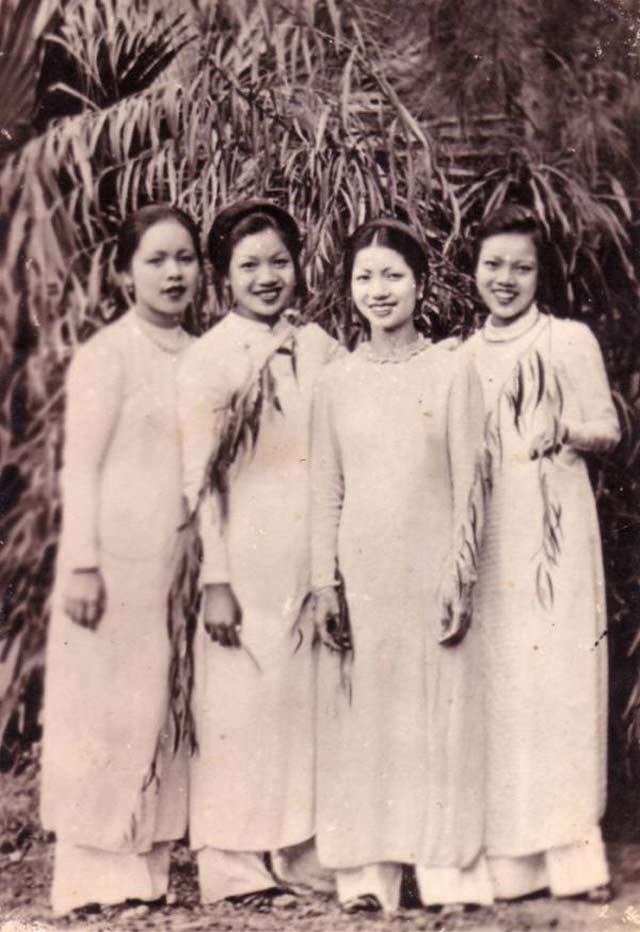 Bốn thanh-nữ Hà-nội mặc y-phục tân-thời kiểu Lemur, 1938. Ngày-Nay tuần-báo 1938.